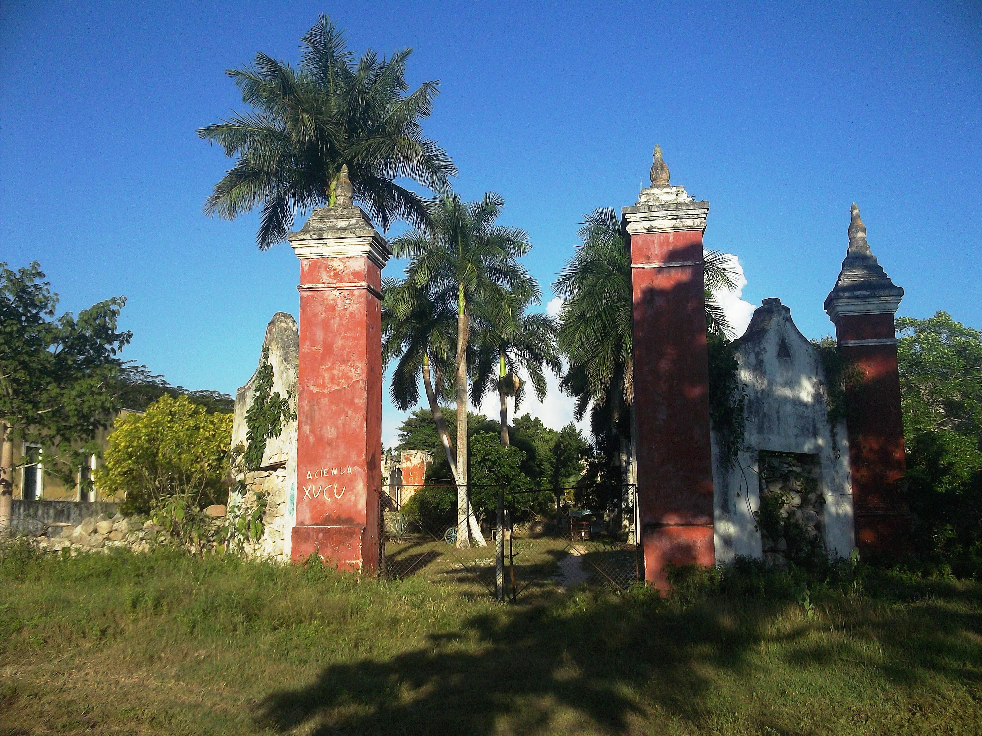 Vista de la hacienda de Xucú, Yucatán.